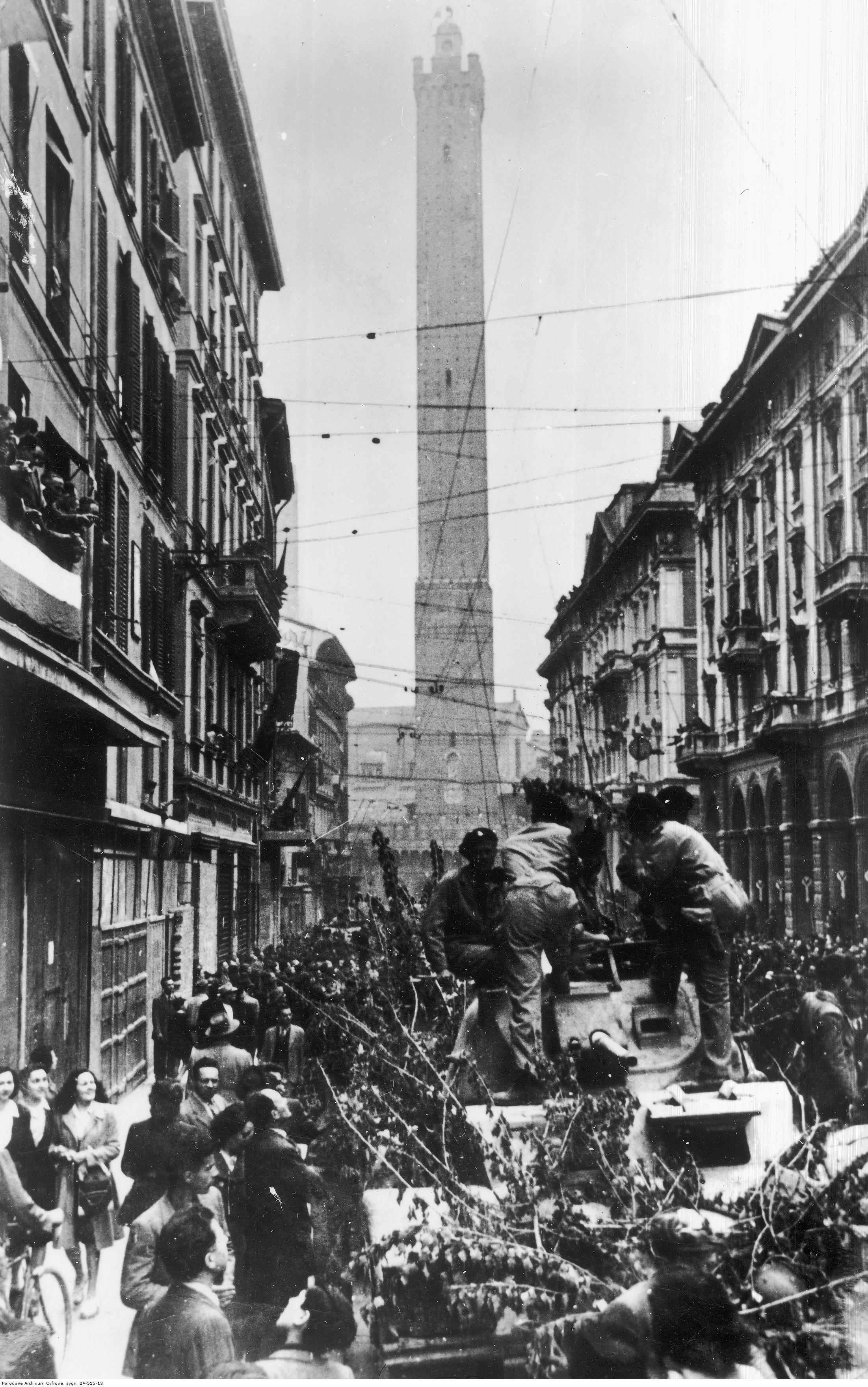 Wkroczenie polskich oddziałów 2 Korpusu Polskiego do Bolonii. Samochód pancerny 1 Pułku Ułanów Krechowieckich T17 (Staghound) witany przez mieszkańców miasta. W tle Torre di Asinelli. Archiwum Fotograficzne Tadeusza Szumańskiego. Sygnatura: 24-515-13